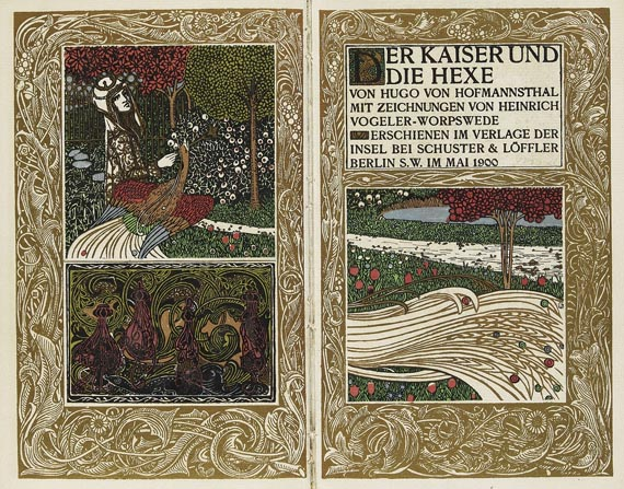 Doppeltitel zu Hugo von Hofmannsthal: Der Kaiser und die Hexe. Berlin, Schuster & Löffler 1900.